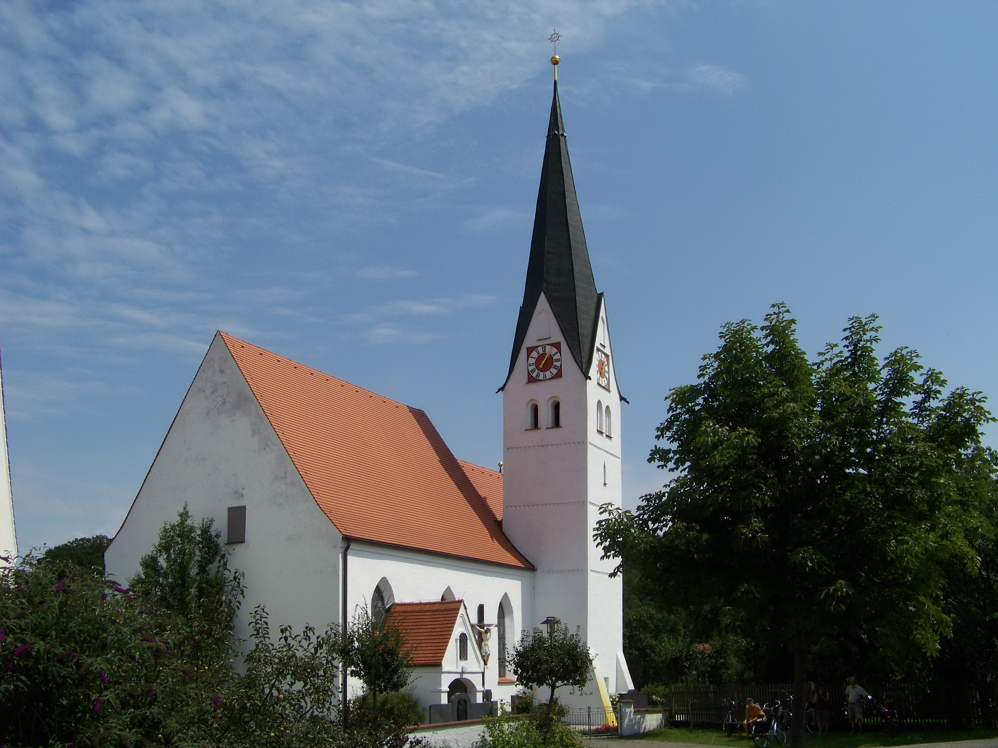 Geisenfeld, Obermettenbach 7. Katholische Filialkirche Mariä Himmelfahrt. 2. Hälfte des 15. Jahrhunderts. Neugotisch restauriert; mit Ausstattung.